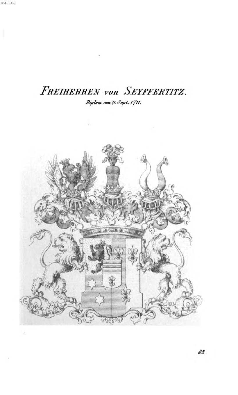 Wappen Seyffertitz - Tyroff AT.jpg